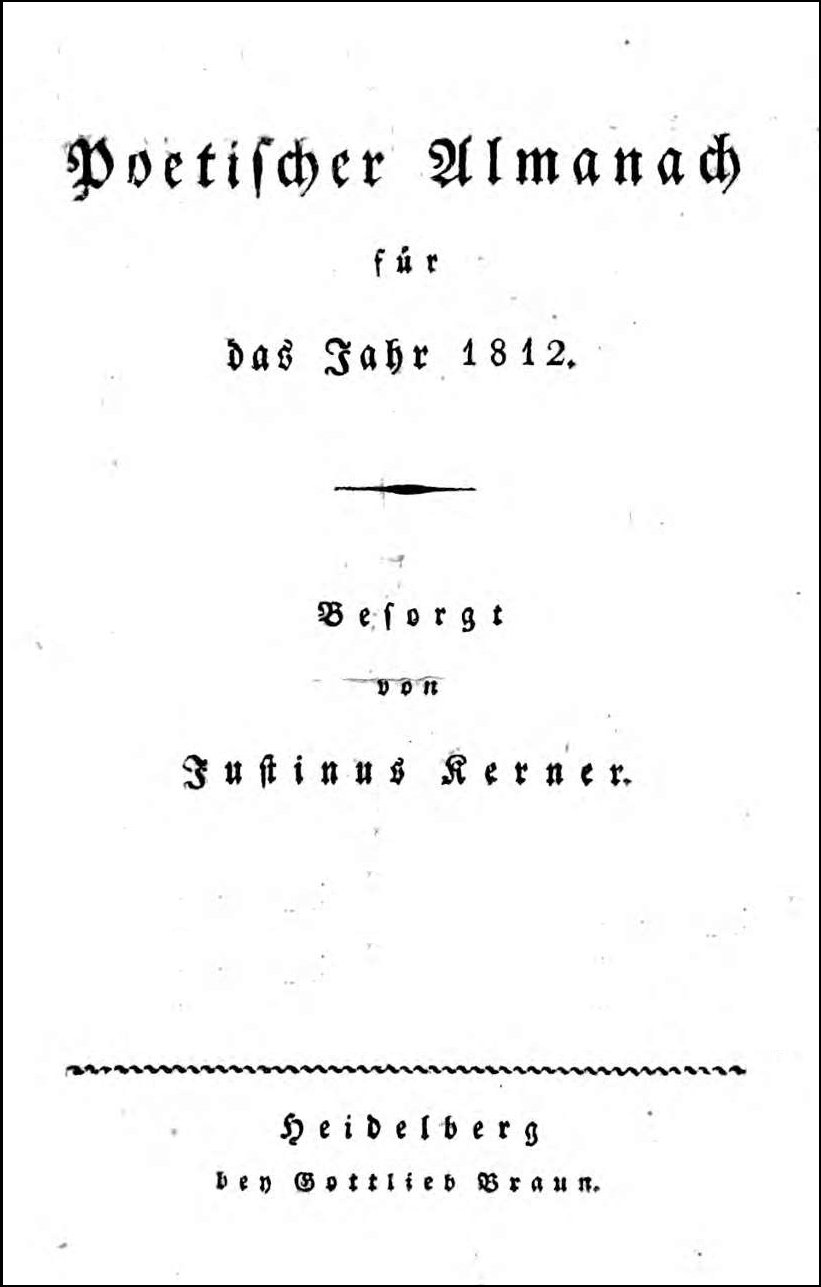 Titelseite von: Justinus Kerner (Herausgeber): Poetischer Almanach für das Jahr 1812. Besorgt von Justinus Kerner Heidelberg : Gottlieb Braun, 1811.